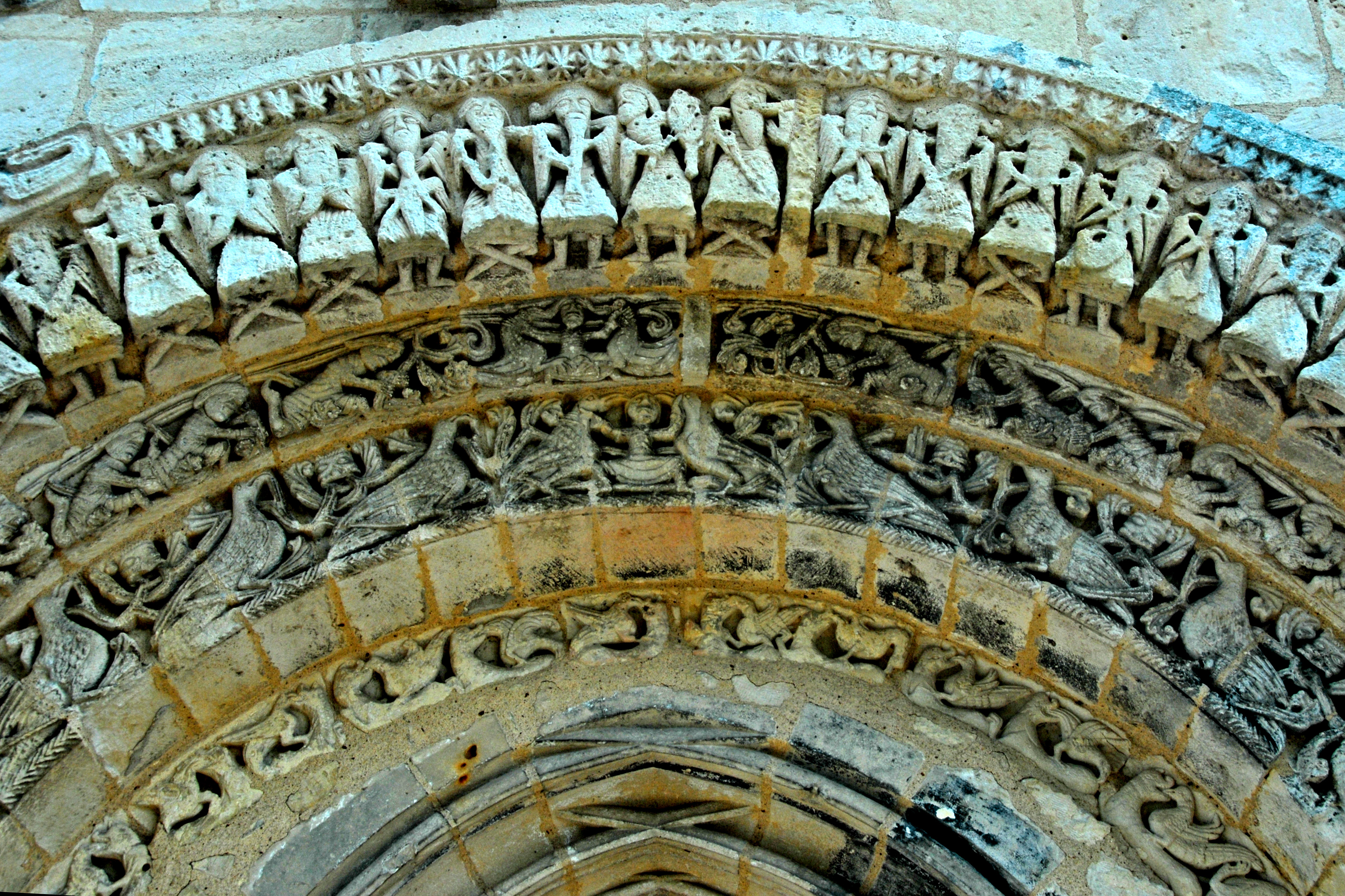 Avy, Archivolten, Mittelteil